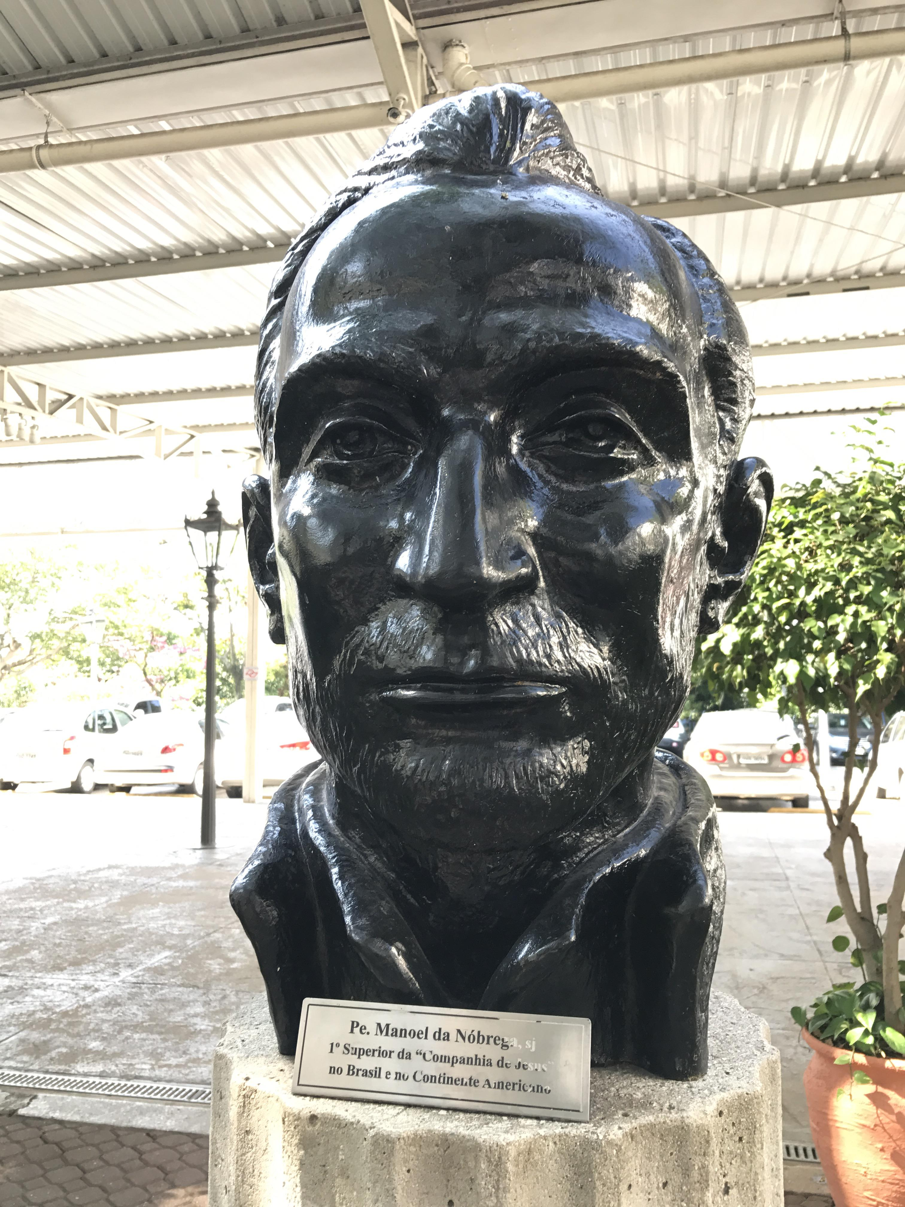 Estátua do primeiro superior da "Companhia de Jesus" no Brasil e no Continente Americano.